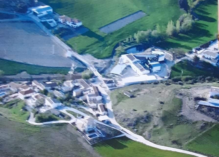 Vista aérea publicada en Revista de Fiestas de Gumiel